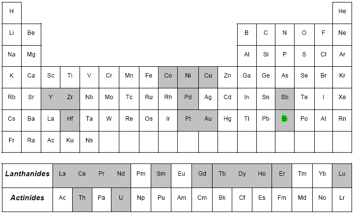 Elements utilises dans l'élaboration de composés 334